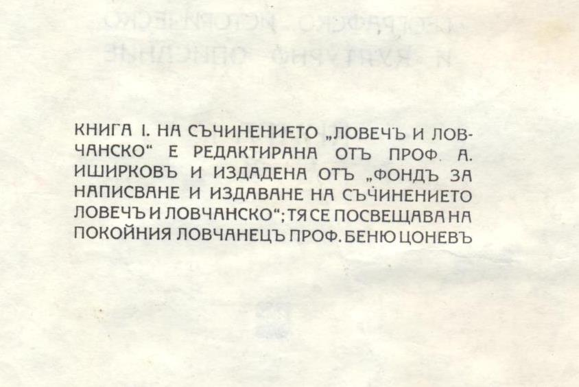 Факсимиле от Ловеч и Ловчанско, книга 1, 1930.